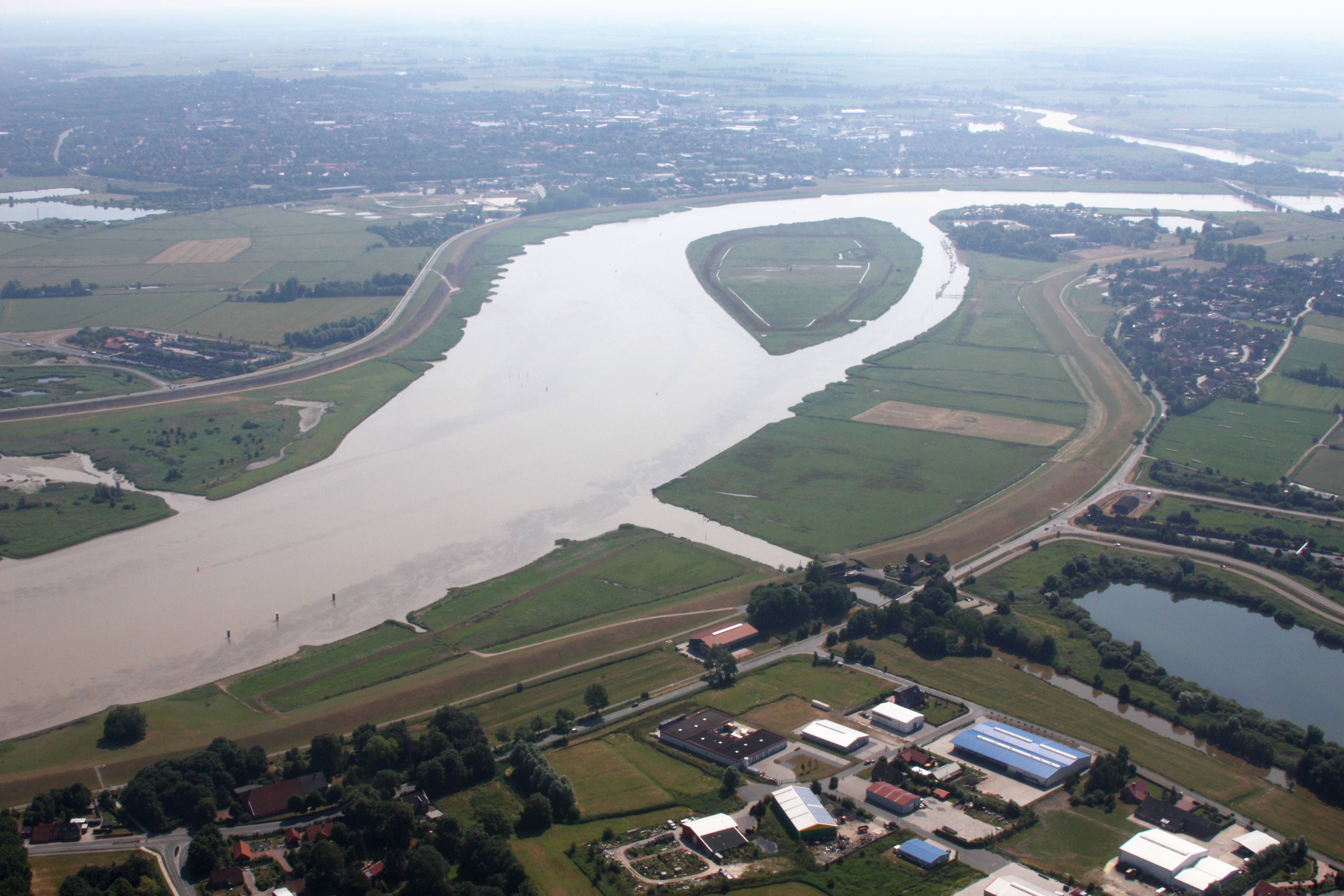 Luftaufnahme; Flug von Leer nach Emden; Flughöhe 1500 ft; Juli 2010; Originalfoto bearbeitet: Tonwertkorrektur und Bild geschärft mit Hochpassfilter